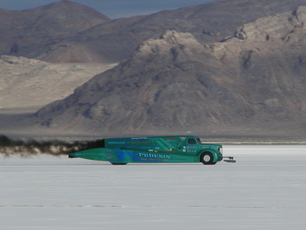 Phoenix Diesel Truck running at the Bonneville Speedway